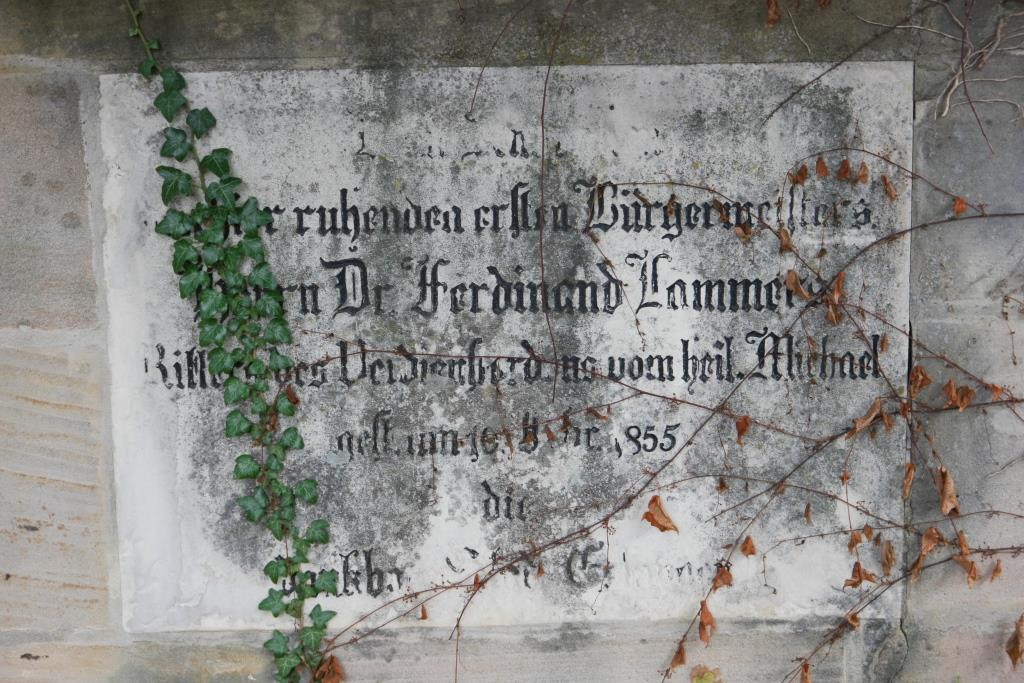 Grab des Juristen und Bürgermeisters Ferdinand Lammers, 1795-1855, auf dem Neustädter Friedhof in Erlangen